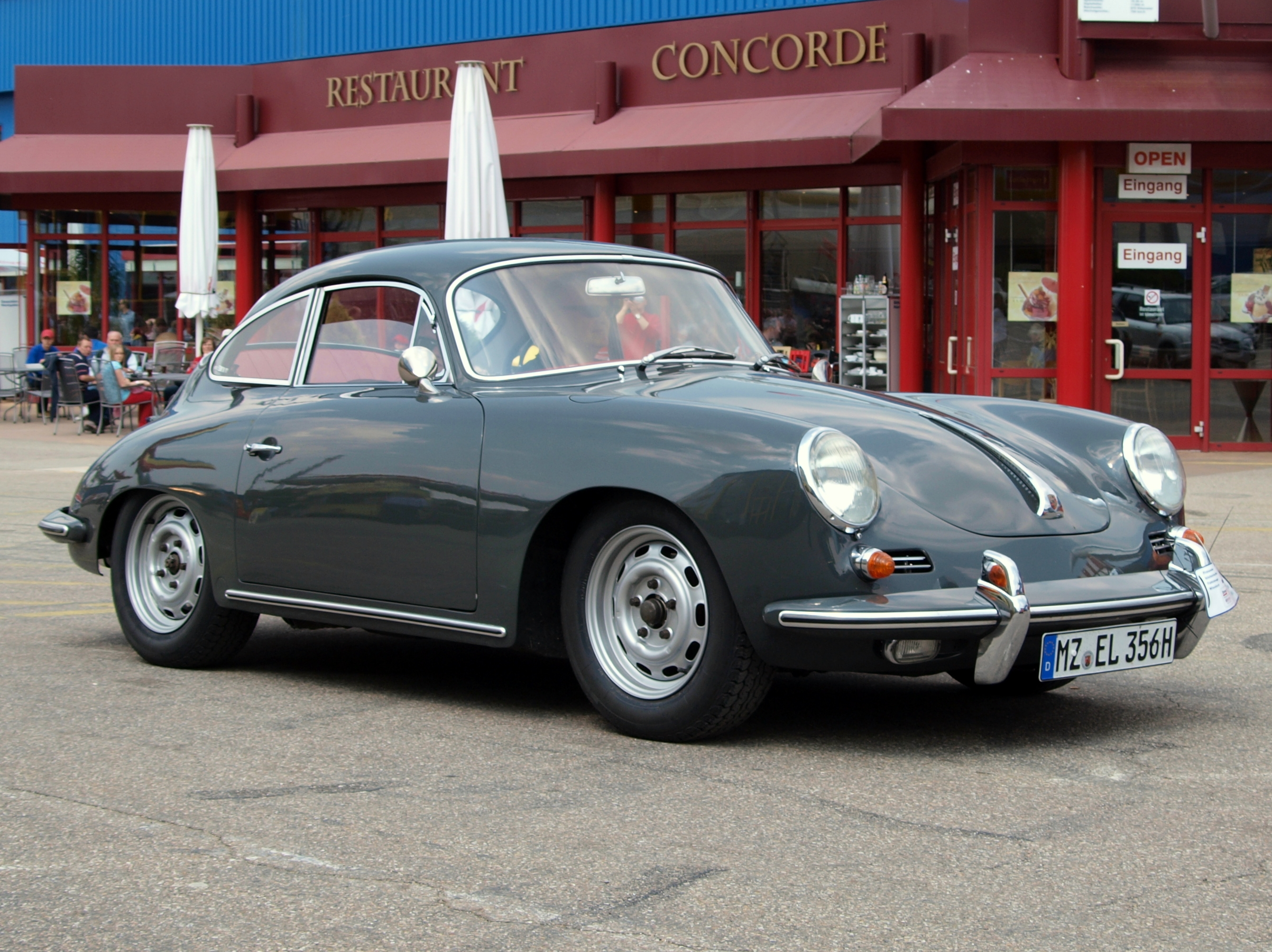 Photographed at the Technik museum Sinsheim, Germany. Participating in the Kurpfalz-Klassik rund um die 1. Tankstelle der Welt.